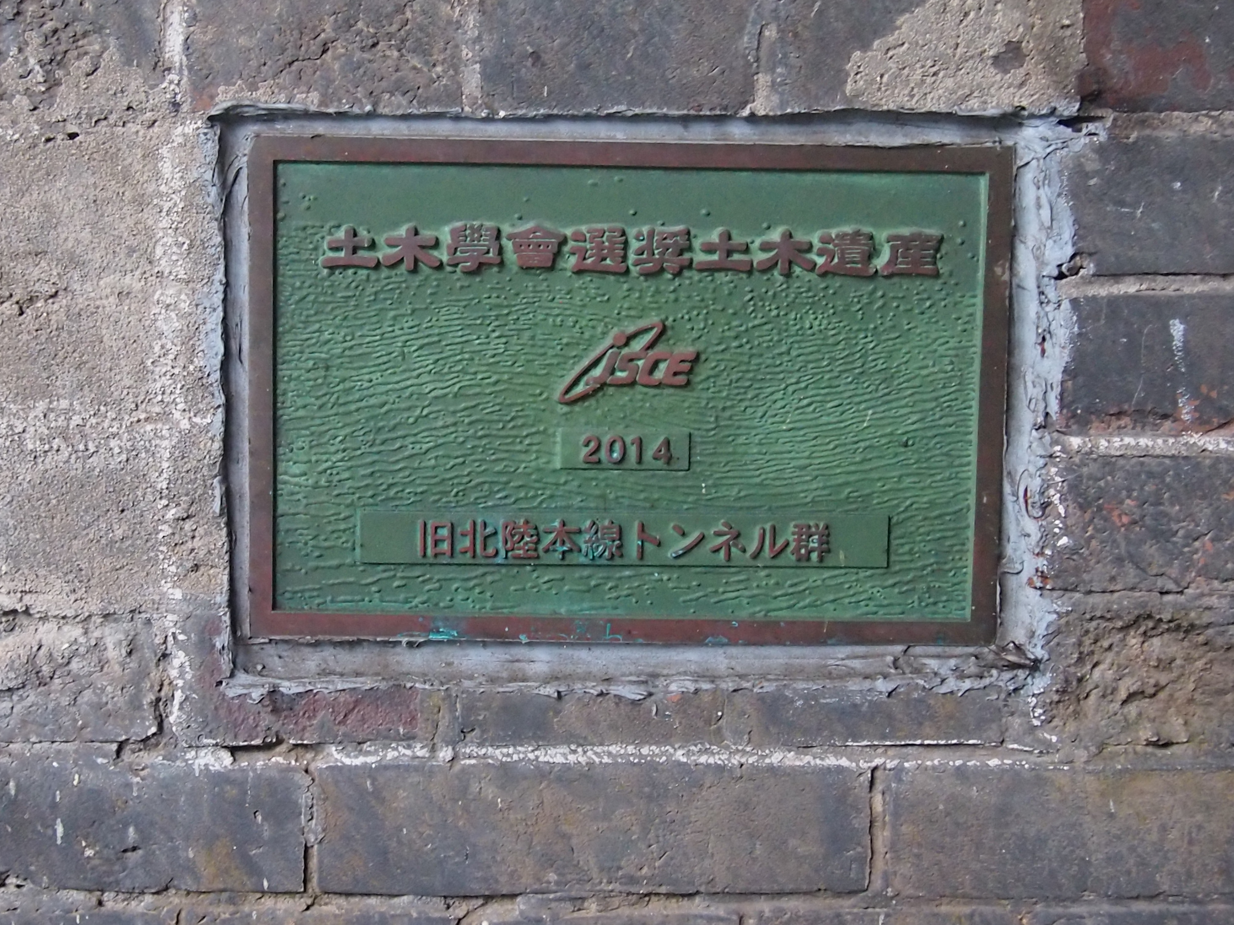 旧北陸線トンネル群の樫曲トンネルは土木学会の選奨土木遺産である。